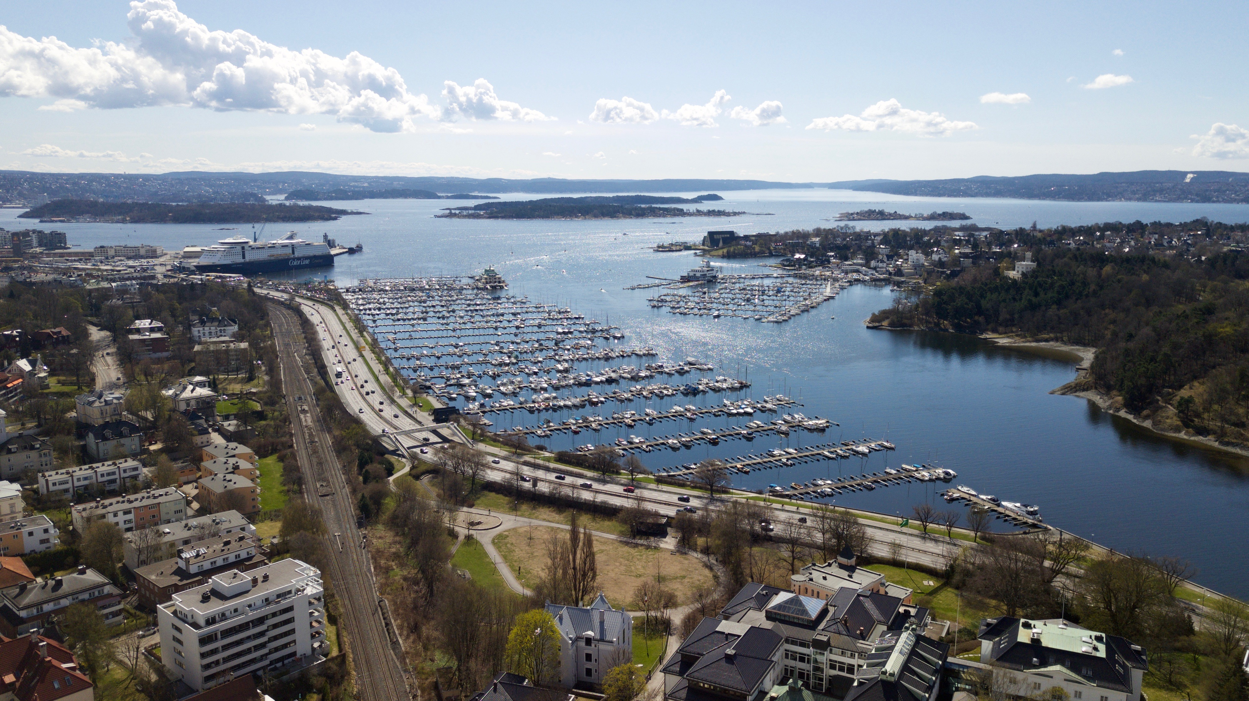 Frognerkilen, E18, Skarpsno. Oslo.